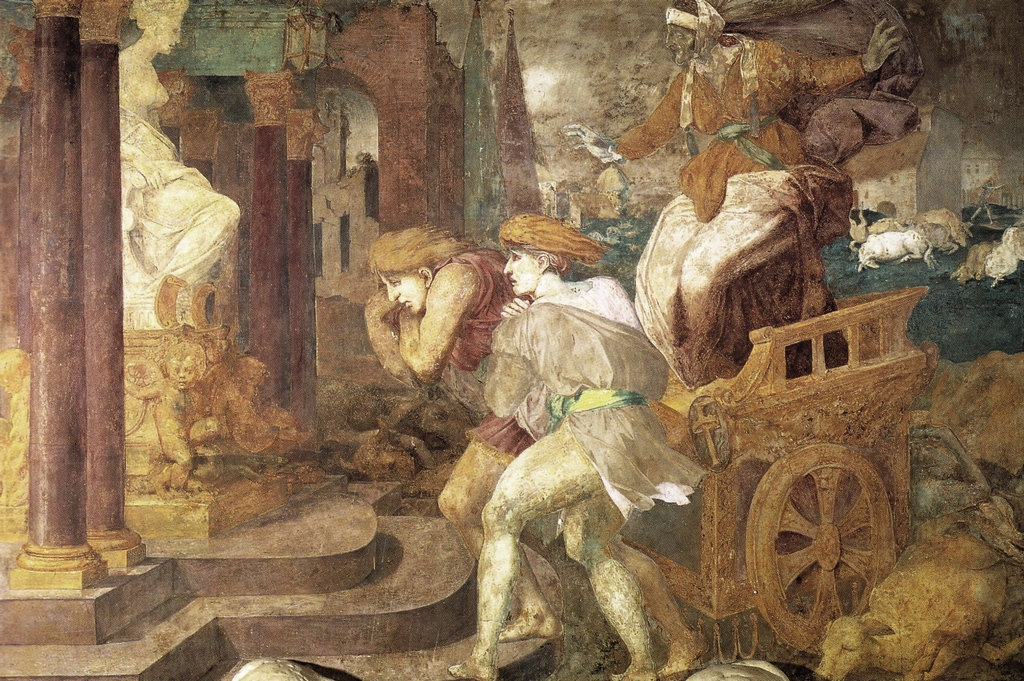 Galleria di Francesco I, Cleobi e Bitone